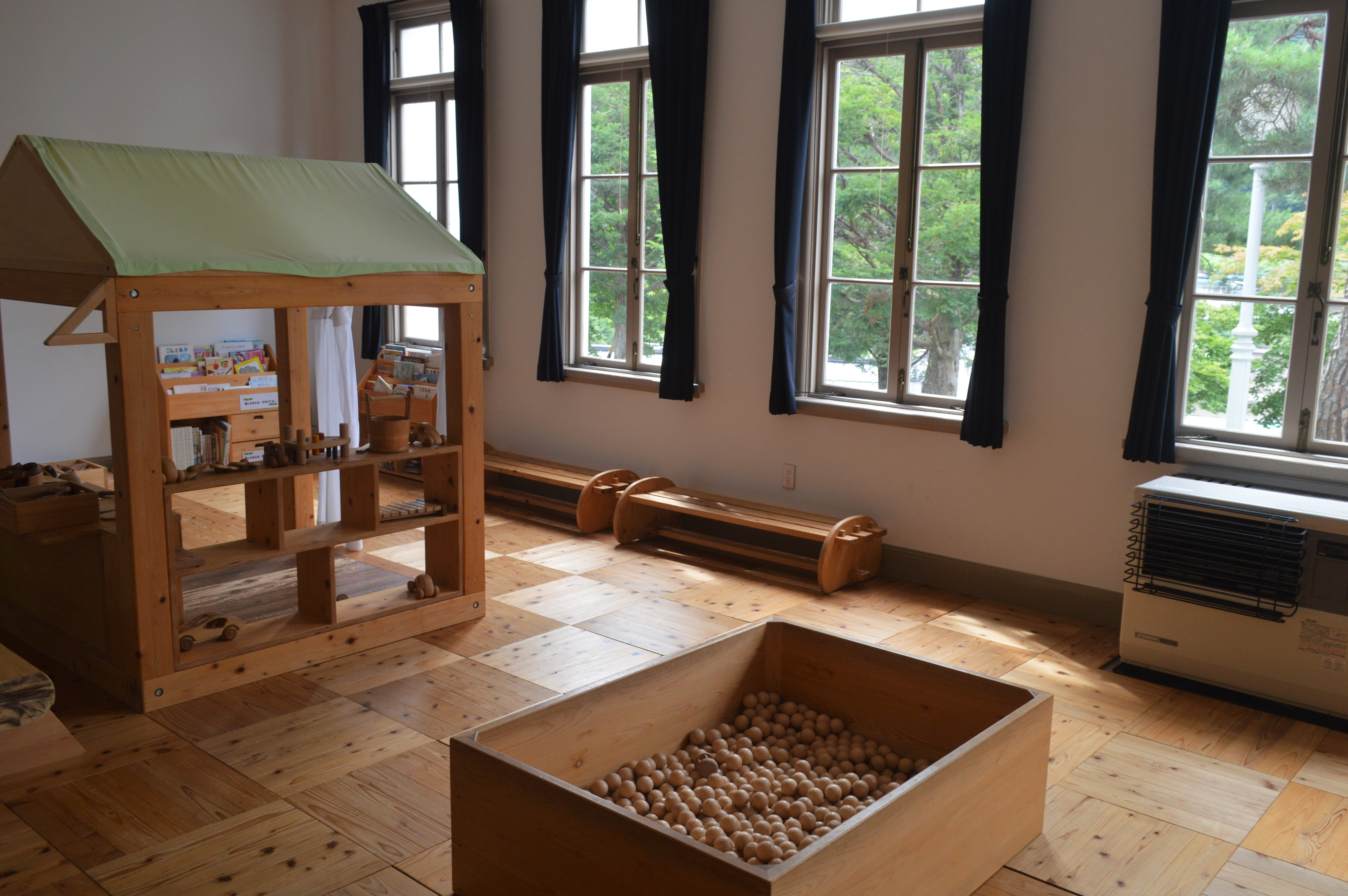 長野県木曽郡木曽町の御料館（旧帝室林野局木曽支局庁舎）。